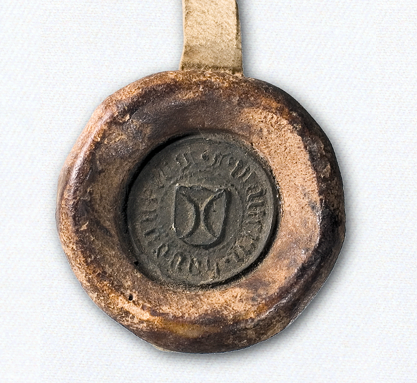 Haunzenbergersöll Haunzenberger Hautzenberger Hautzenperger Siegel Wappen Bodenkirchen Halbmonde 1463 Urkunde